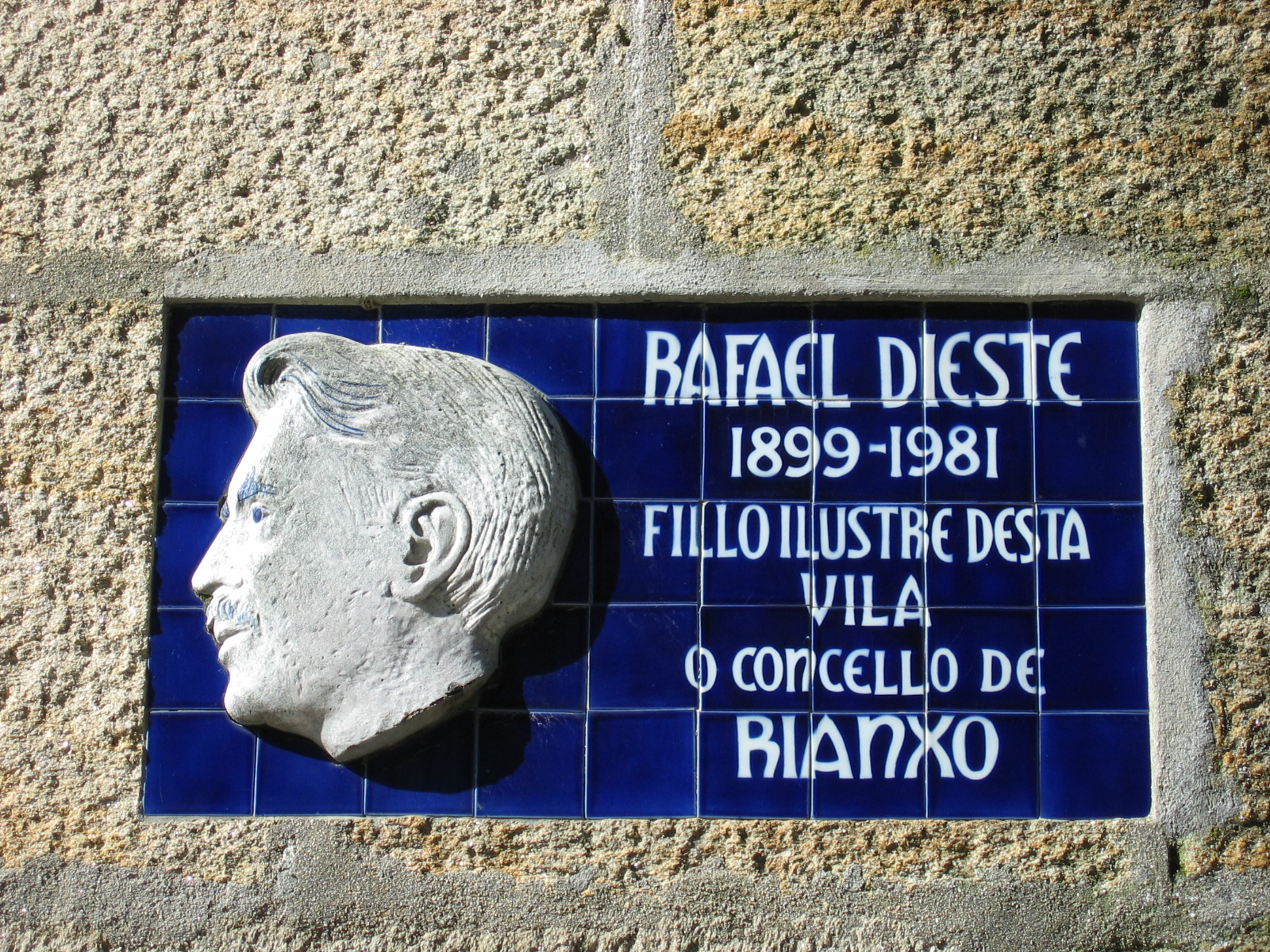 Placa na casa onde viviu Rafael Dieste (Rianxo).